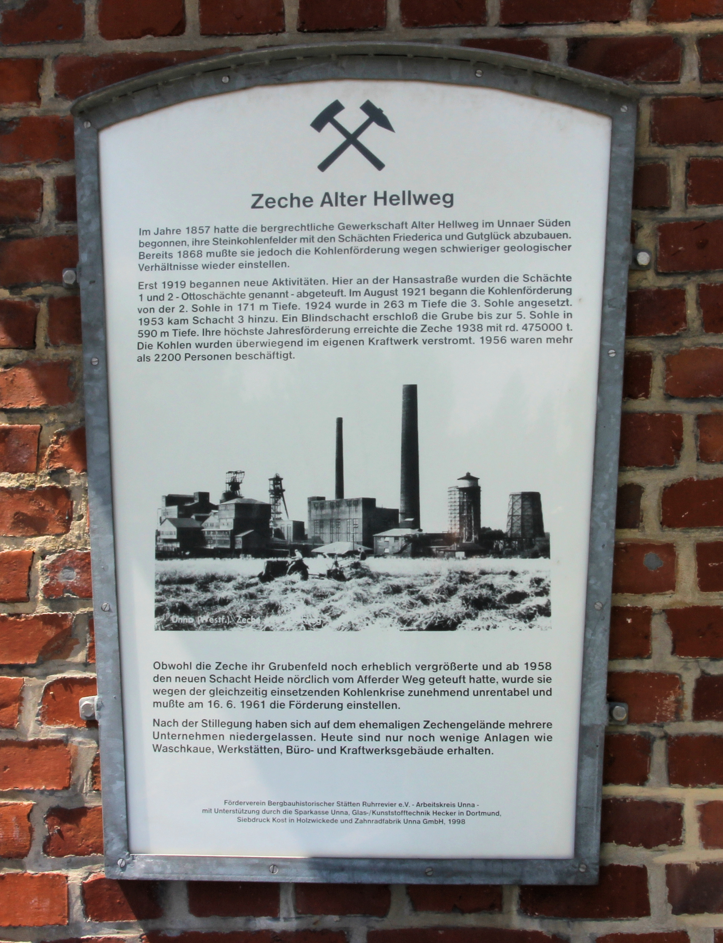 Gedenktafel der ehemaligen Zeche Alter Hellweg in Unna